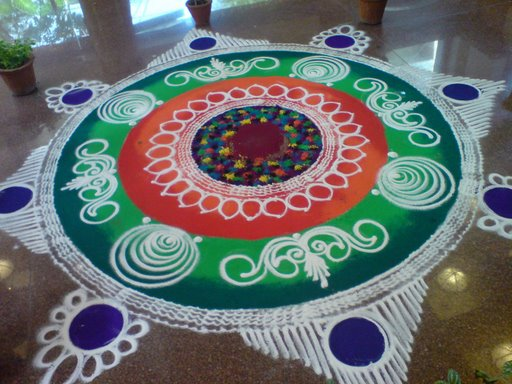 Rangoli at a hotel in Pune, India